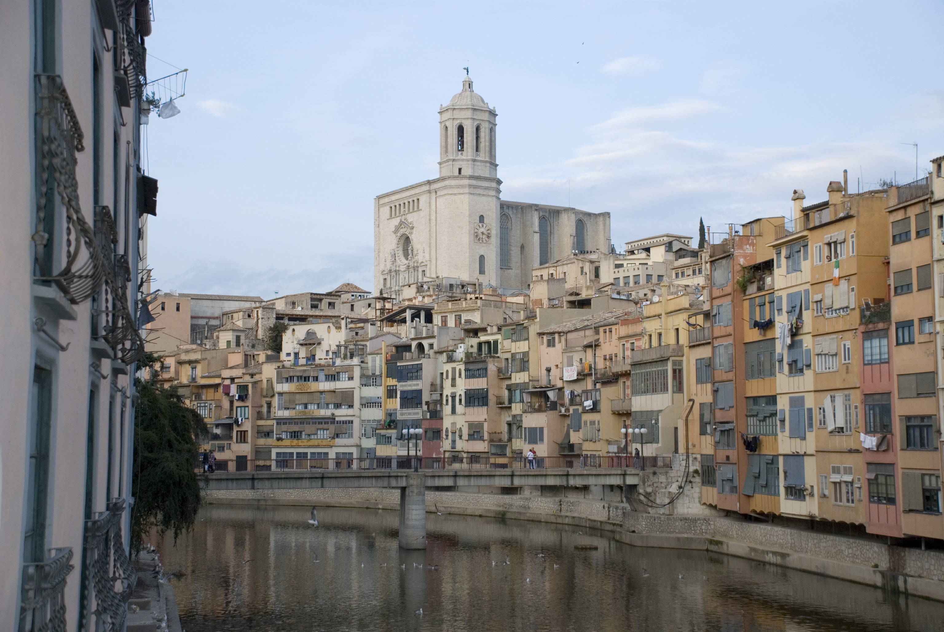 La Catedral i el riu Onyar de Girona Camera data Camera Nikon D80 Lens Nikon AF-S DX 18-135 mm Focal length 32mm mm Aperture f/4.2 Exposure time 200 s Sensivity ISO 250